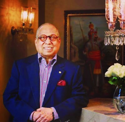 സി പി കൃഷ്ണൻ നായർ